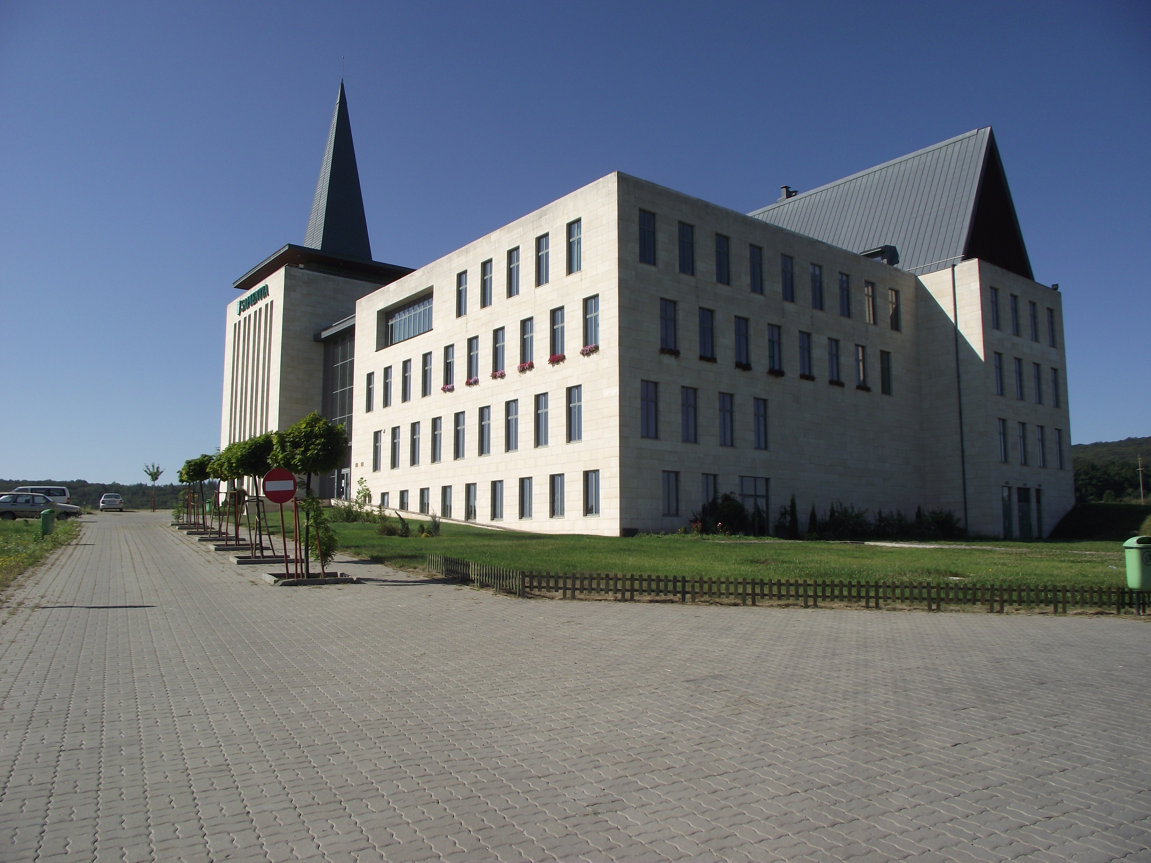 A marosvásárhelyi Sapientia - Erdélyi Magyar Tudományegyetem campusa.